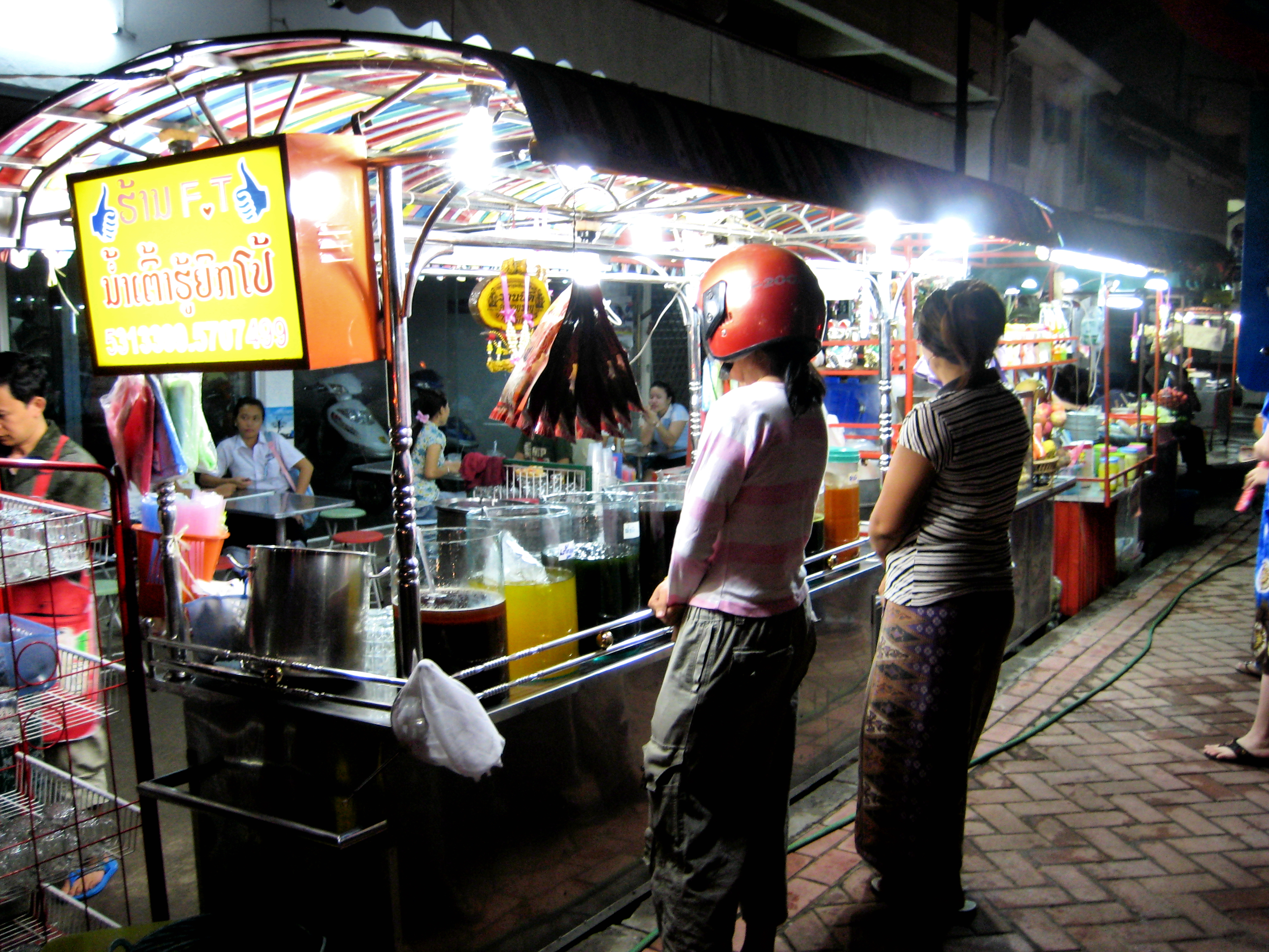 Vientiane night market